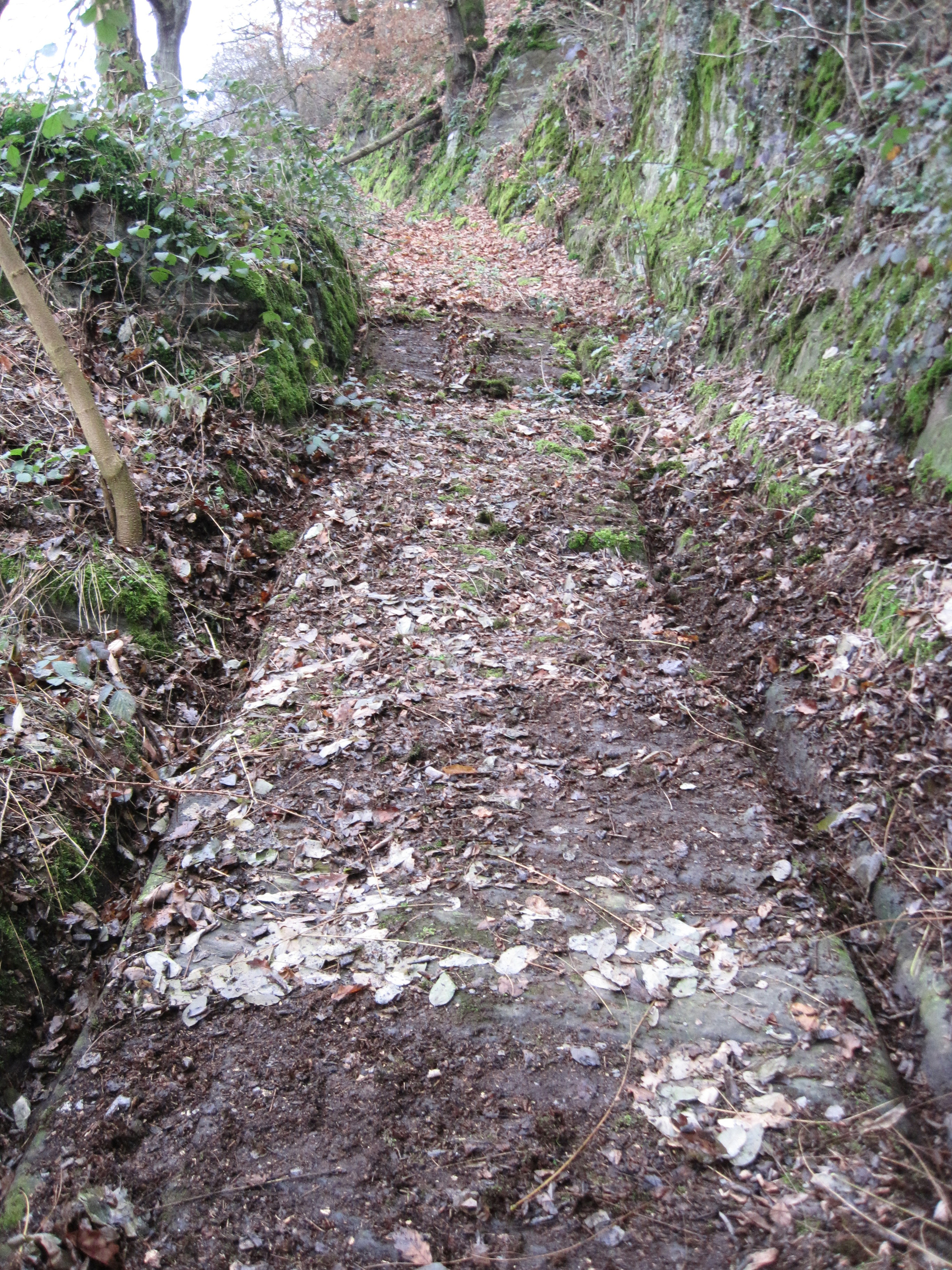 Abschnitt einer römischen Straße, steil ansteigendes Teilstück mit eingetiefeten Radspuren (Geleisestraße). Ein ca. 50m langer Abschnitt wurde in den 1970er Jahren freigelegt. Alte Verbindung von Bacharach nach Rheinböllen, von dort Anschluss an die Ausoniusstraße. Bacharach-Neurath an der K24, Kreis Mainz-Bingen. Object location50° 03′ 14.33″ N, 7° 45′ 46.76″ E